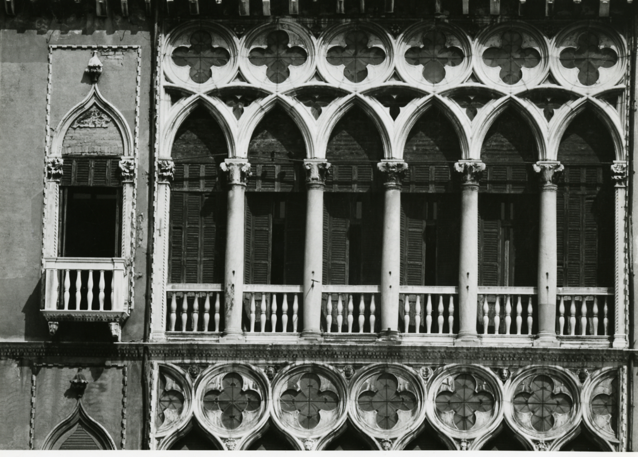 Servizio fotografico : Venezia, 1969 / Paolo Monti. - Stampe: 6 : Positivo b/n, gelatina bromuro d'argento/ carta, 24x30. - ((Al verso delle stampe manoscritti i numeri dei negativi corrispondenti (formato 35 mm) con indicazione del fotogramma: 826/37ì6, 844/7, 844/51, 844/71, ; iscrizioni didascaliche manoscritte a matita; timbro a inchiostro con copyright (Via Tasso - Milano). - Sul coperchio della scatola iscrizione didascalica manoscritta a pennarello nero: "Venezia gotica". - Occasione: Documentazione per la pubblicazione: Arslan Edoardo, "Venezia gotica: architettura civile gotica veneziana", Milano, Electa, 1970. - Fonte: Monografia di Arslan, Edoardo: Venezia gotica: architettura civile gotica veneziana, Milano, Electa (1970)